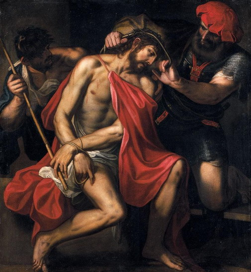 Коронування терновим вінцем аноніма із Венеції кінця 16 ст.